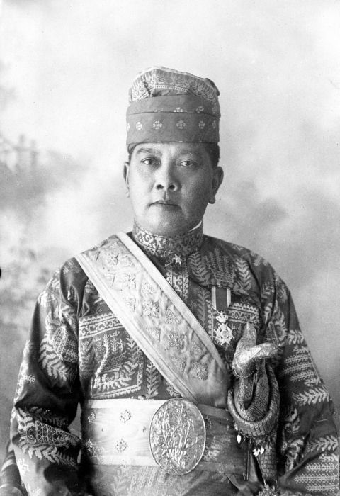 Repronegatief. Studioportret van Amaluddin Sani Perkasa Alam Shah, Sultan van Deli